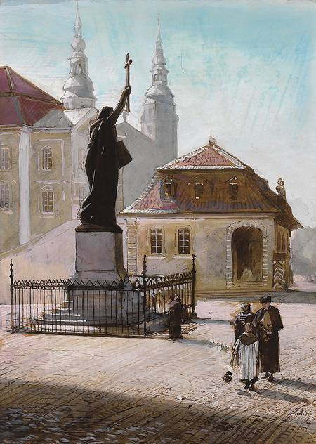 Louis Kolitz: "Fulda. Alte Wache und Bonifatiusdenkmal von Werner Henschel". Gouache. 33 x 24 cm